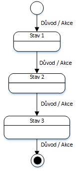 Vzor stavového diagramu využívaného metodikou MMABP.